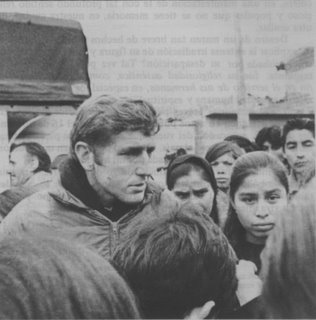 Padre Carlos Mugica, sacerdote y activista social argentino.